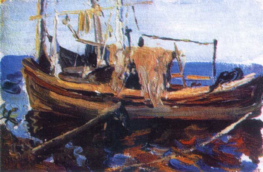 Малютин Сергей Васильевич. Рыбацкий баркас. 1920